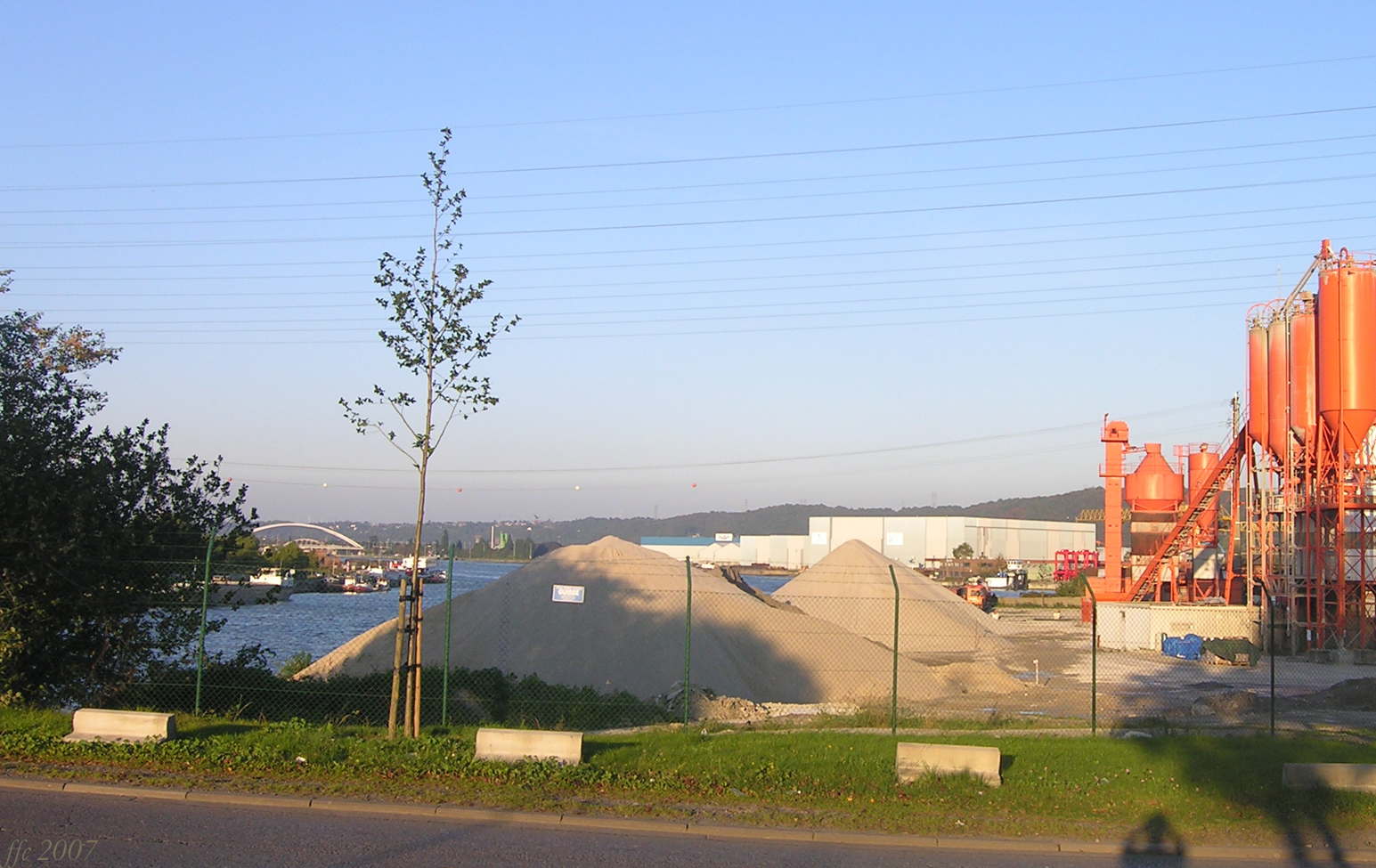 Port de Liège - trémies et sable